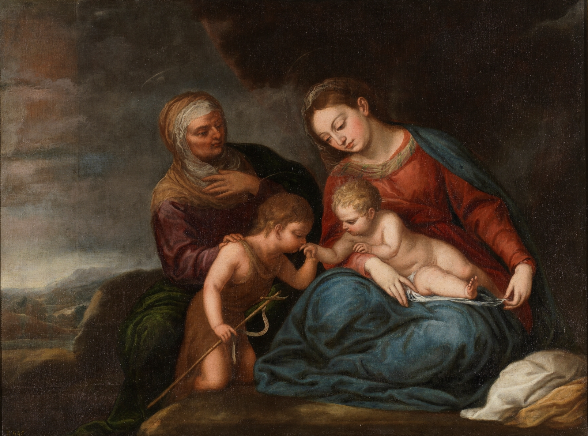 La obra representa a la Virgen María junto al Niño Jesús, Santa Isabel y San Juan Bautista.